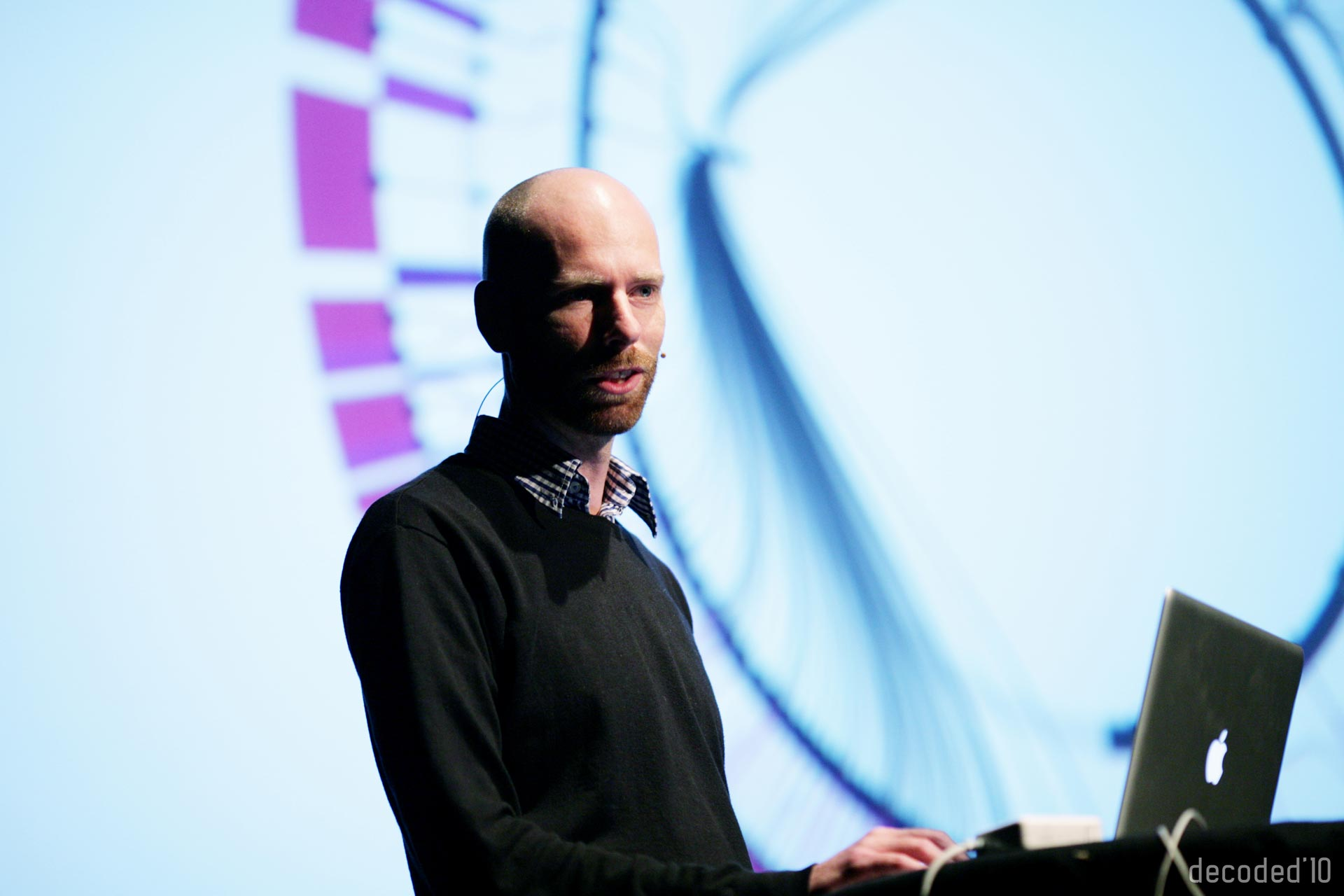 Generative Gestaltung